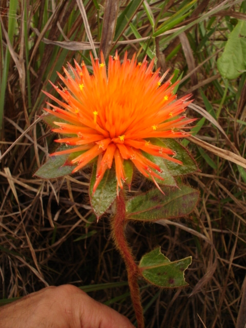 Descrição: Gomphrena arborescens L.f. em seu habitat natural, porte herbáceo, janeiro de 2006. Autor: Wilson Muanis Godinho Resolução: 480X640